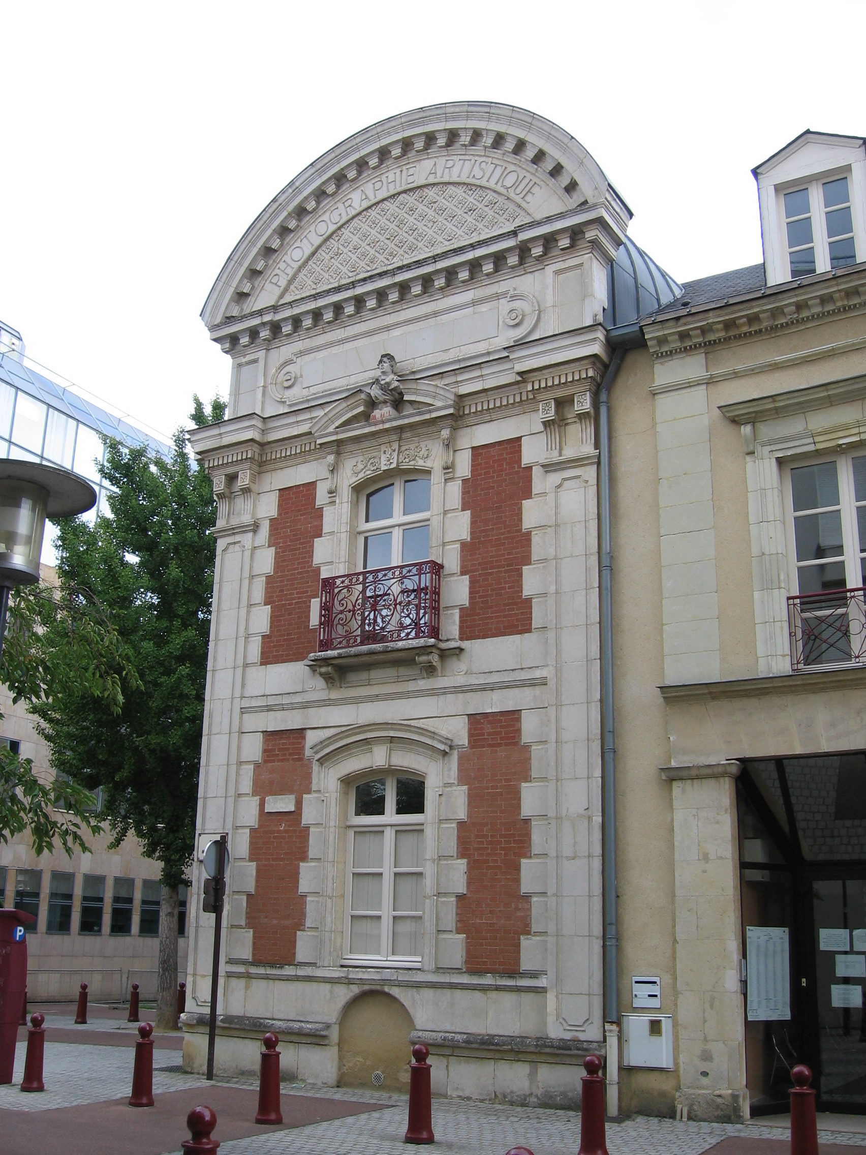 Maison construite en 1873 pour Gustave Cosson artiste-photographe à Le Mans, Sarthe, France